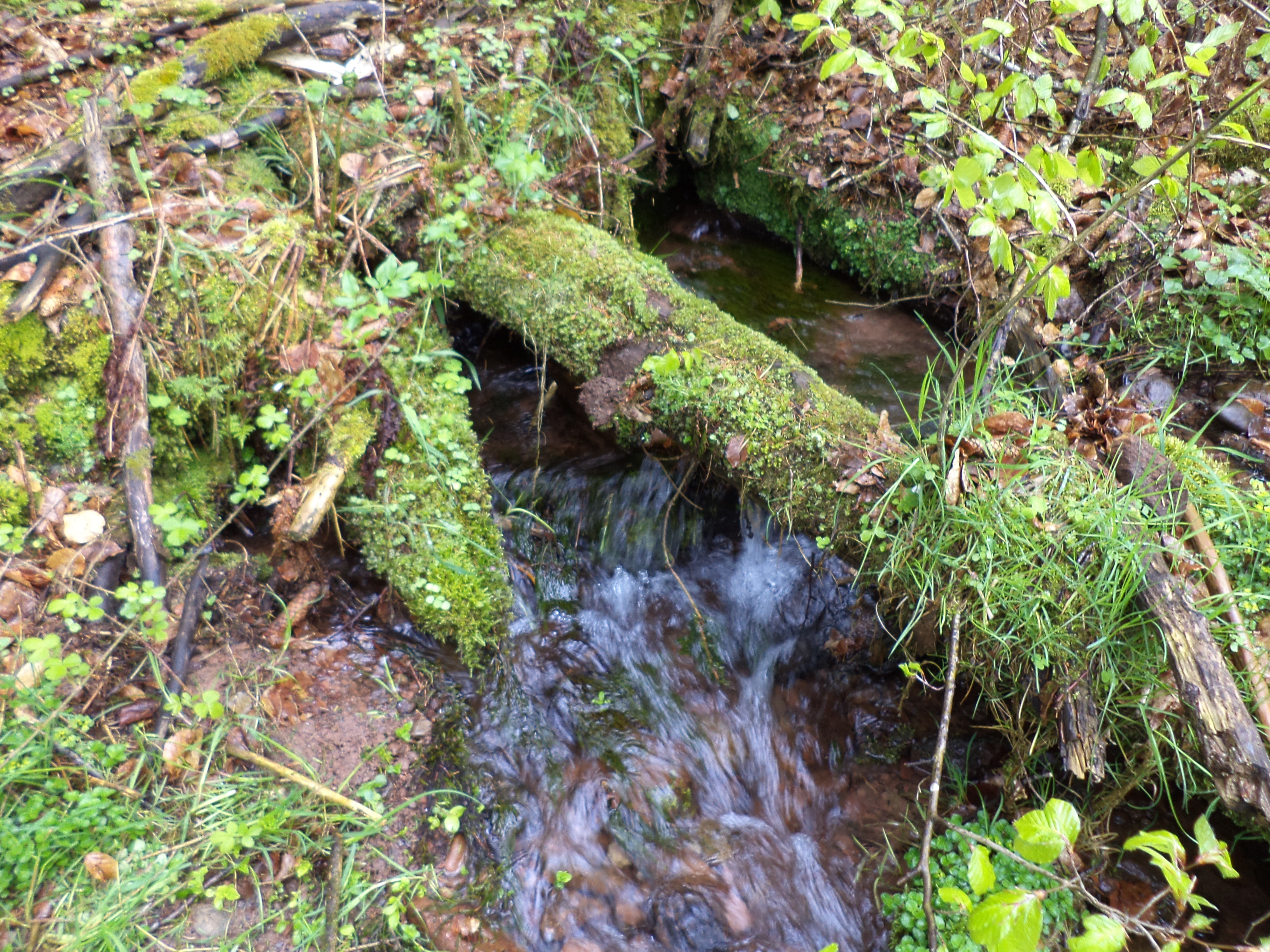 Eine Hauptquelle des Springbrunnens bei Bischbrunn